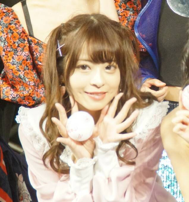 桜もこさん（2019年10月24日 LADY MADONNA 拡大版(川崎クラブチッタ)にて撮影）